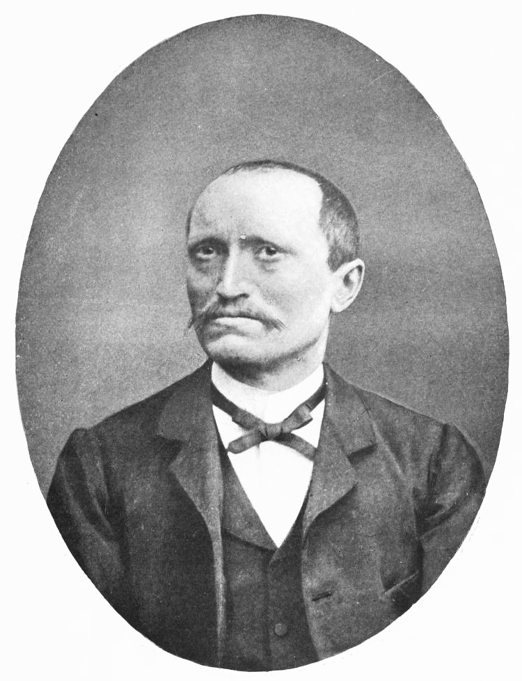 Pierre Rondou, French entomologist